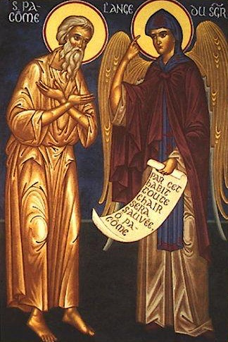 Saint Pacôme le Grand recevant de l'ange la Règle de son Ordre (icône Byzantine).